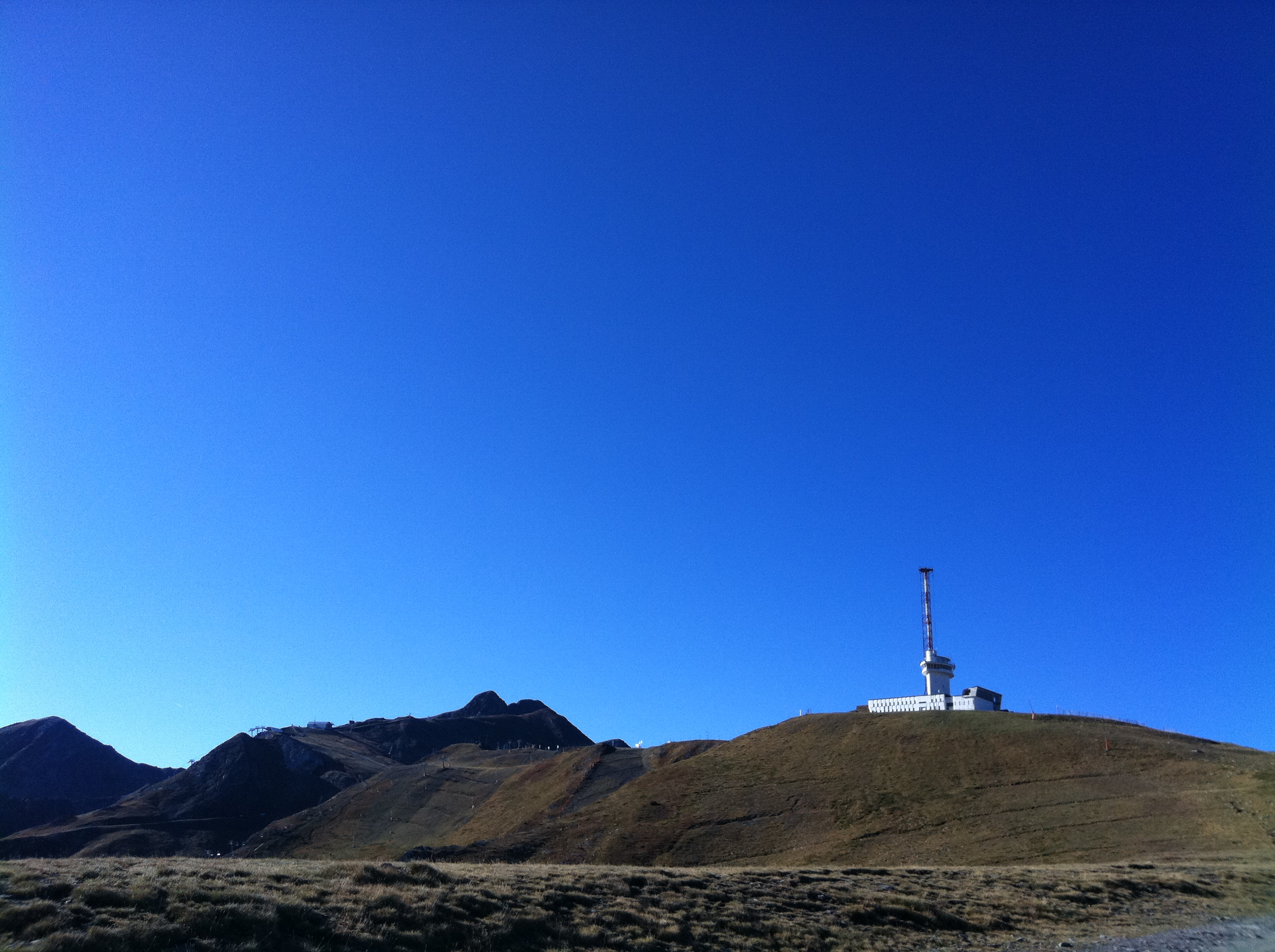 Emissora de Sud-Ràdio